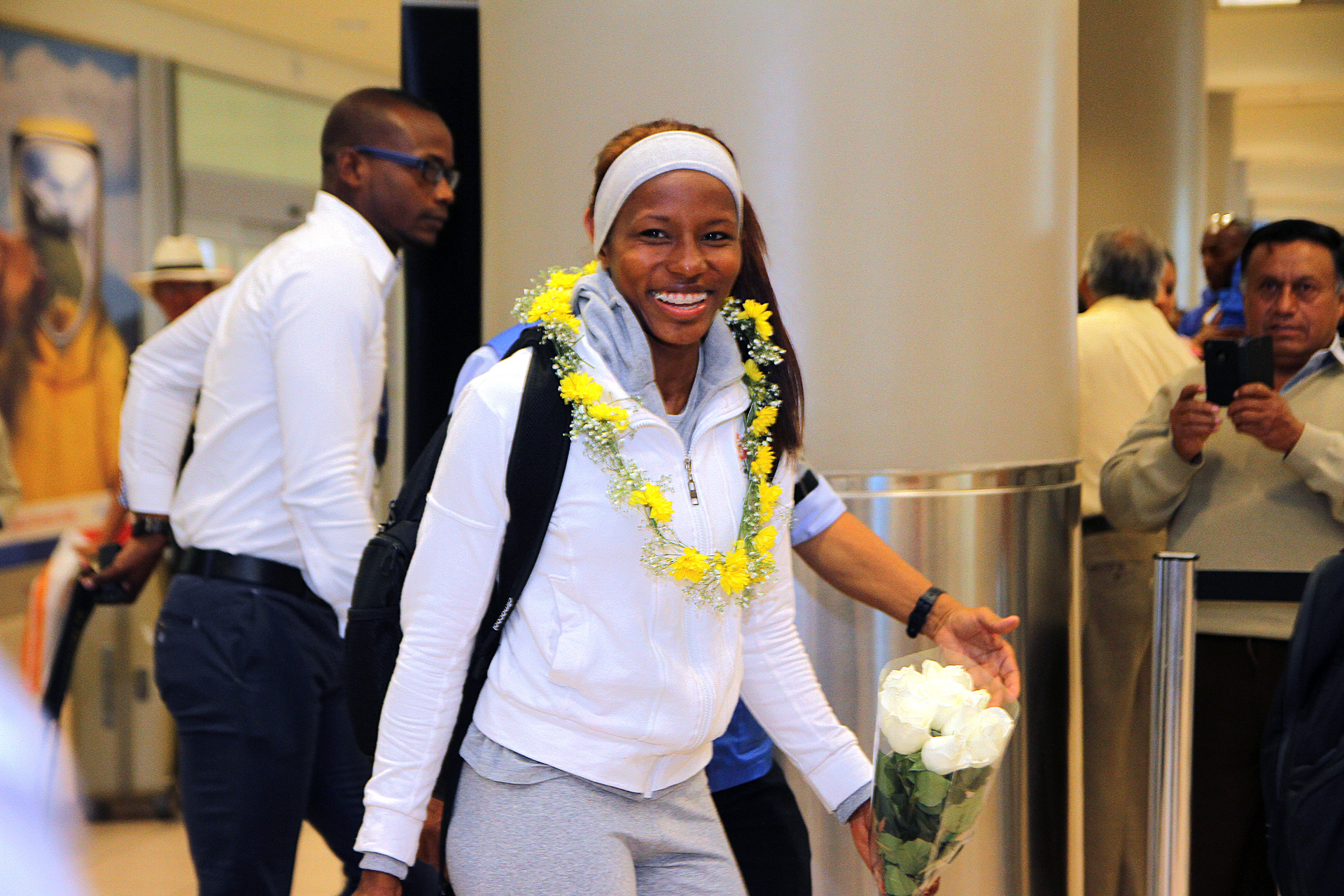 Quito, 12 may (Andes).- La mañana de este martes aterrizó en el aeropuerto de Tababela la deportista Angela Tenorio después de completar su clasificación a las olimpiadas en Río 2016.